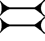 Cuneiform sign